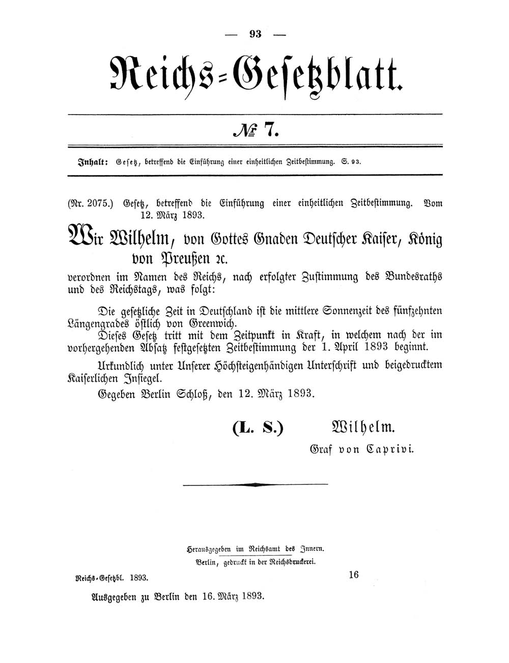 Reichsgesetzblatt 1893 Seite 93